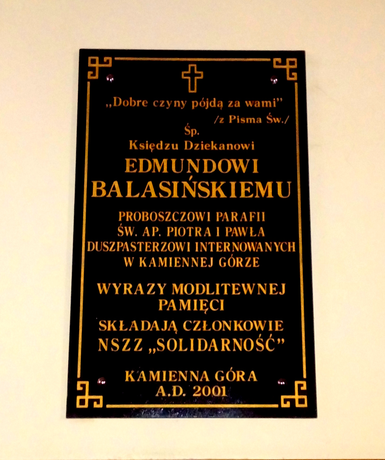 Kościół Świętych Apostołów Piotra i Pawła w Kamiennej Górze - tablica upamiętniająca ks. Edmunda Balasińskiego